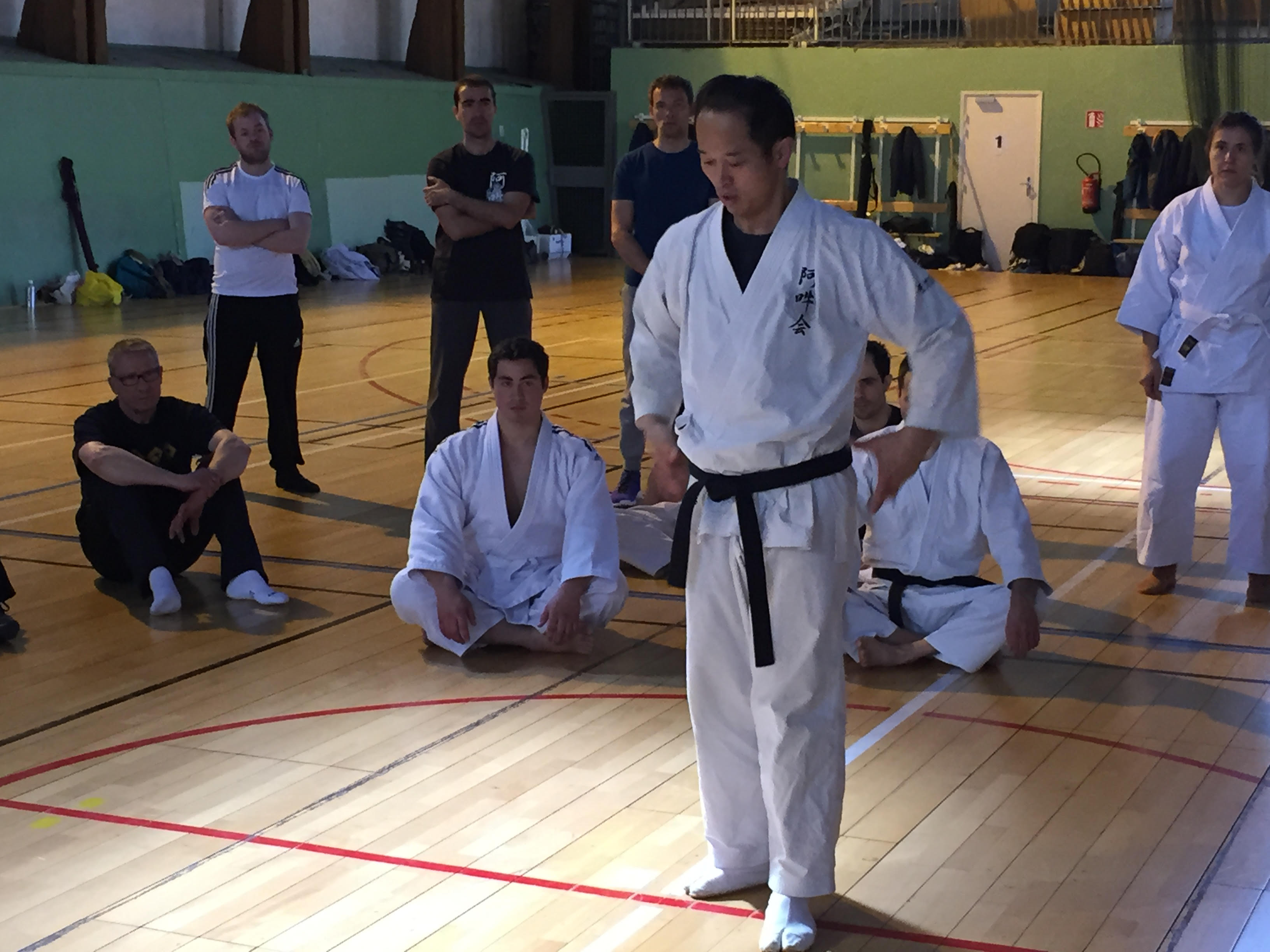 Stage Aunaki à Paris